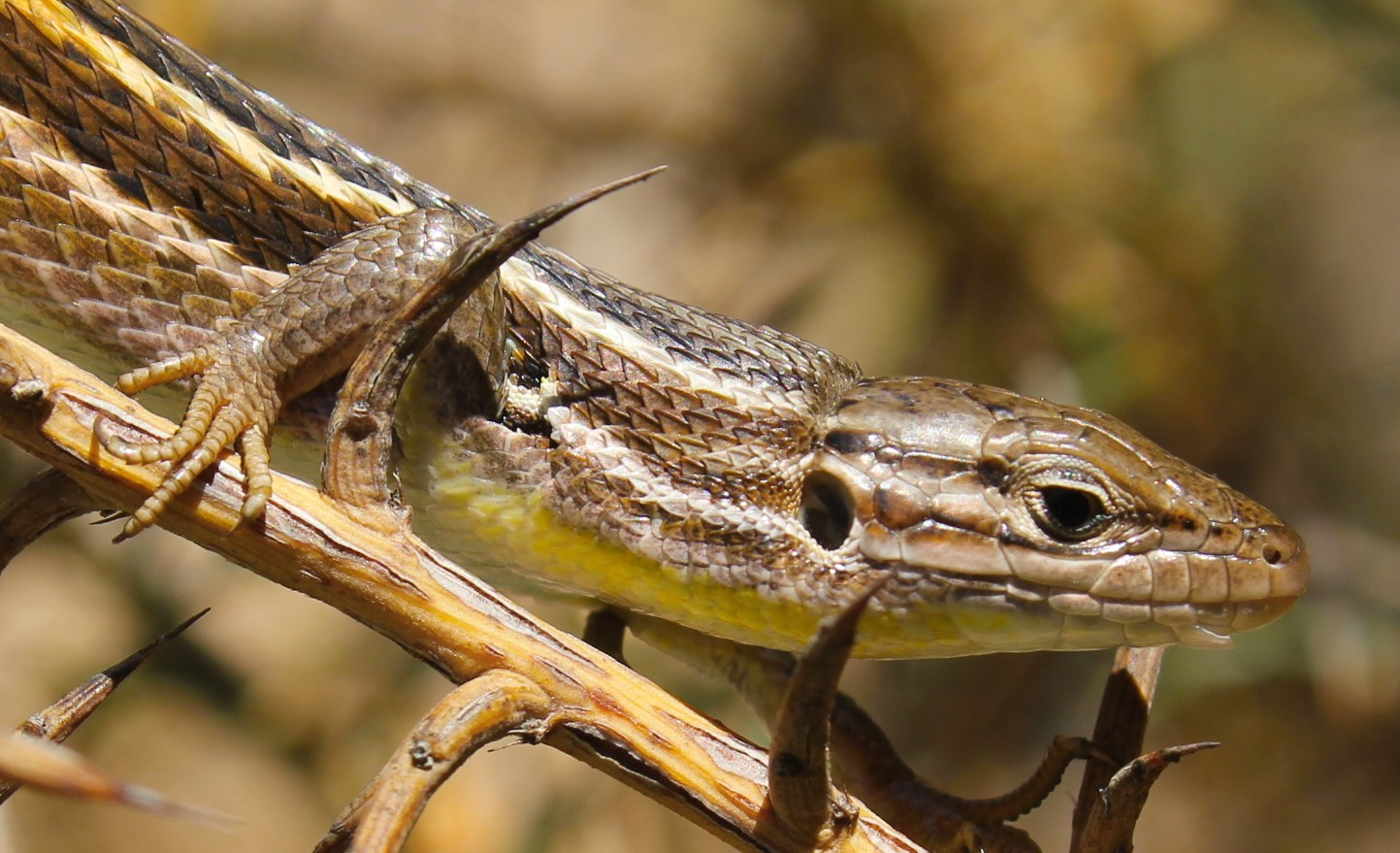 Psammodromus jeanneae, adulto asoleándose en una genista en la Sierra de Chinchilla (Albacete, España).